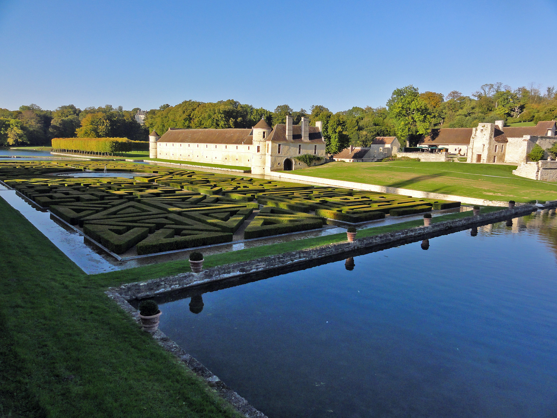 Jardins d'eau et manoir du XVIe siècle du domaine de Villarceaux, Chaussy, Val-d'Oise, France.